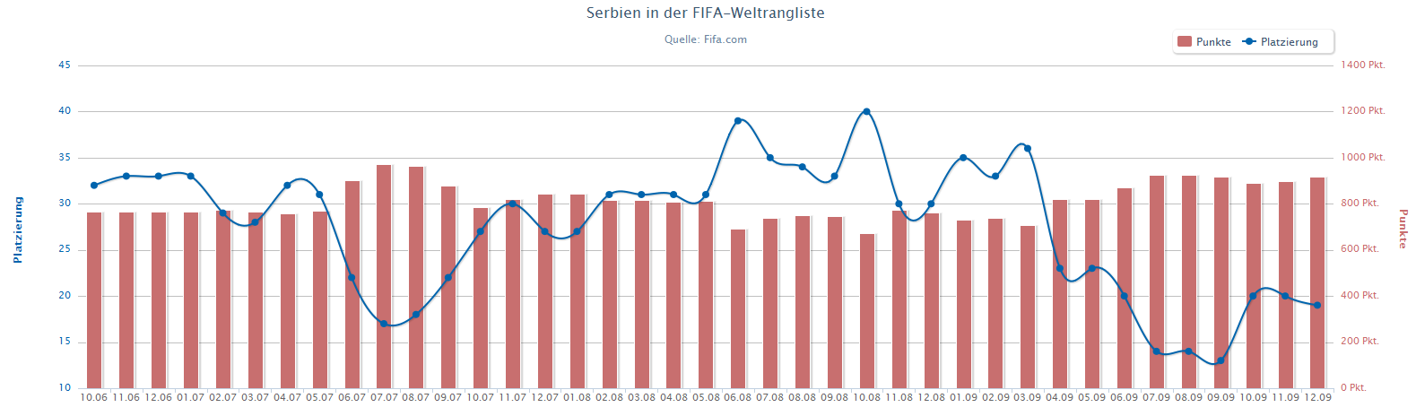 Serbien auf der FIFA-Weltrangliste vom 10.06-12.09